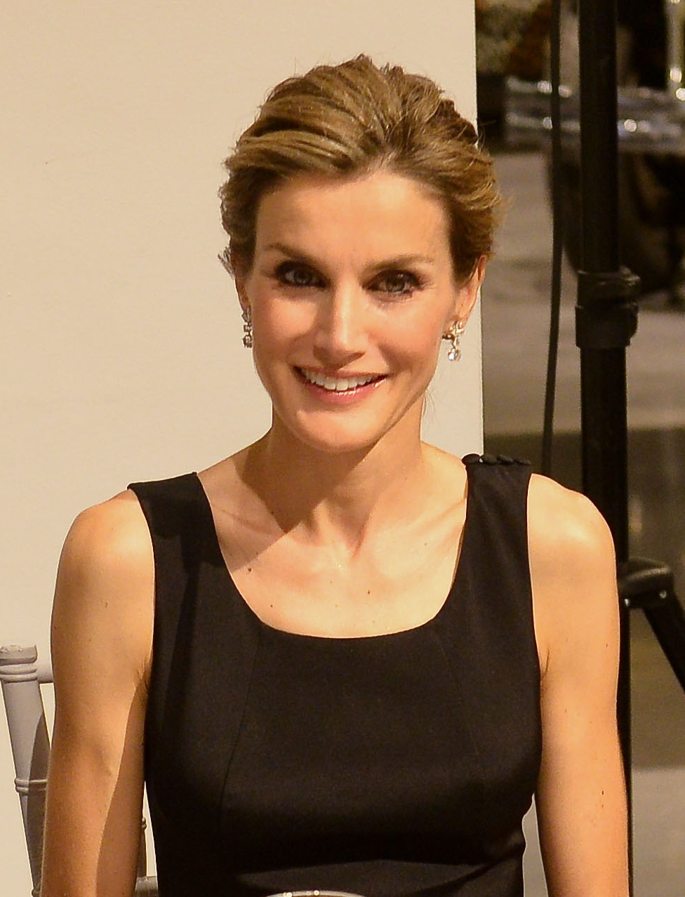 Letizia Ortiz el 5 de septiembre de 2014